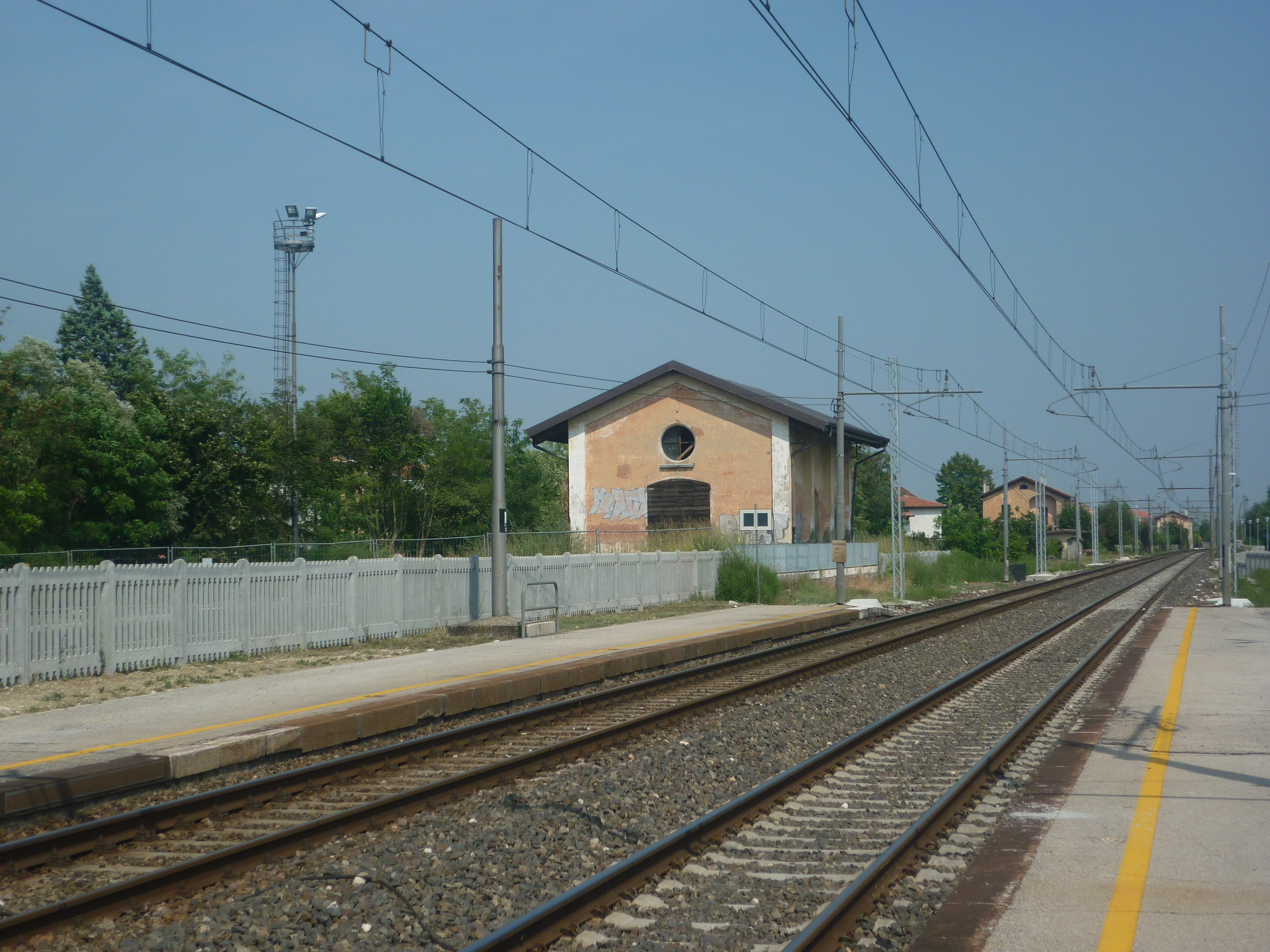 fs